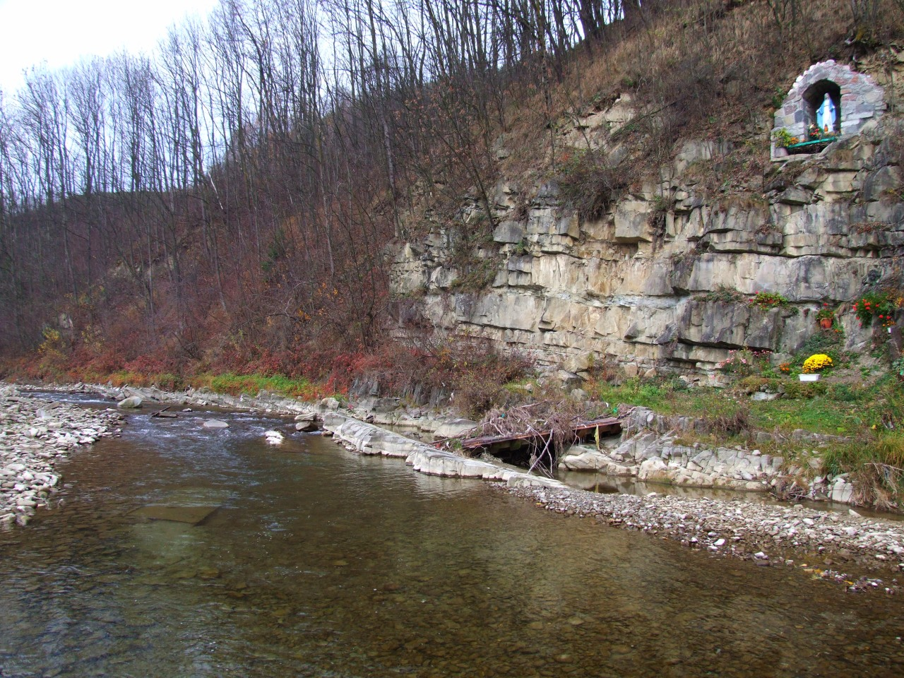 Rzeka Ochotnica w Ochotnicy Górnej